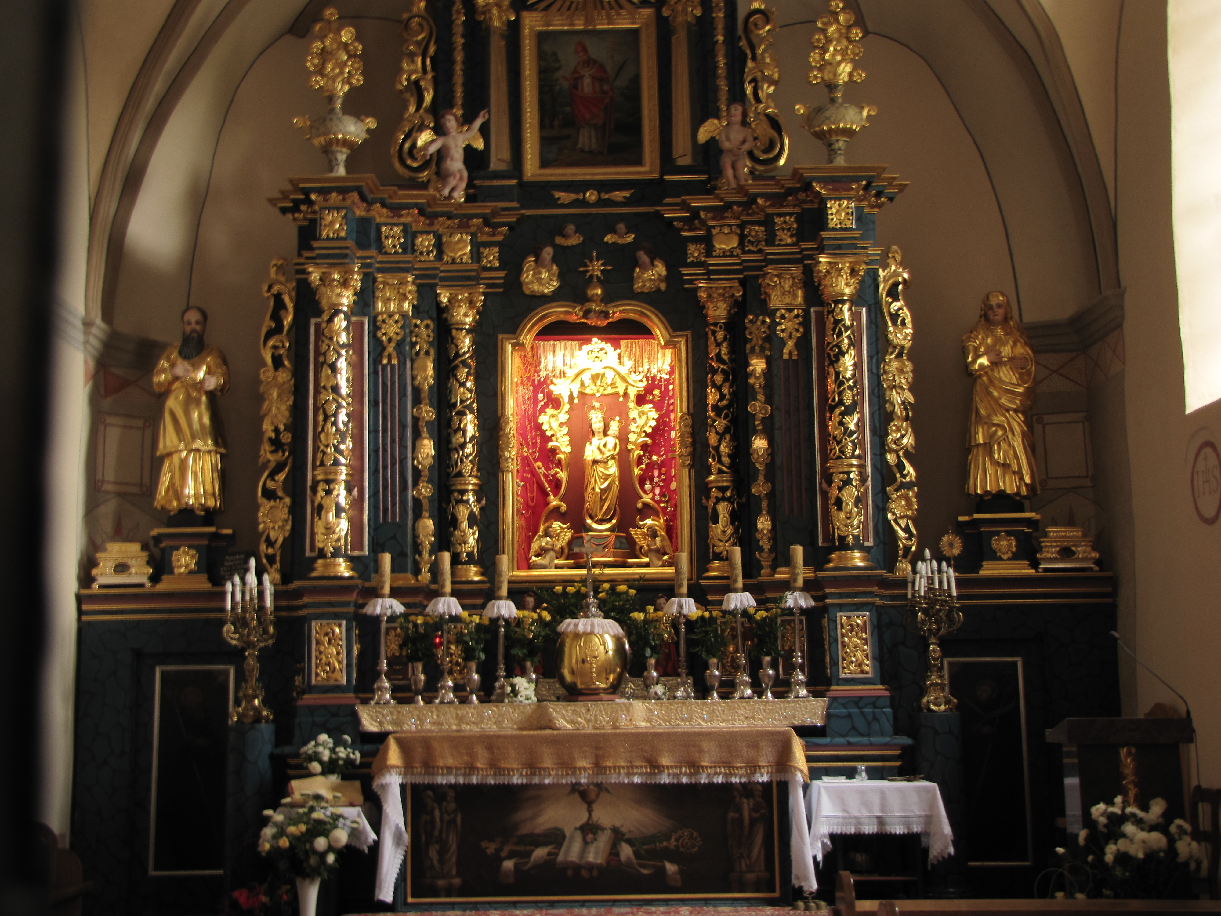 zespół kościoła p.w. św. Wojciecha Wąwolnica kaplica Matki Boskiej Kębelskiej przy kościele